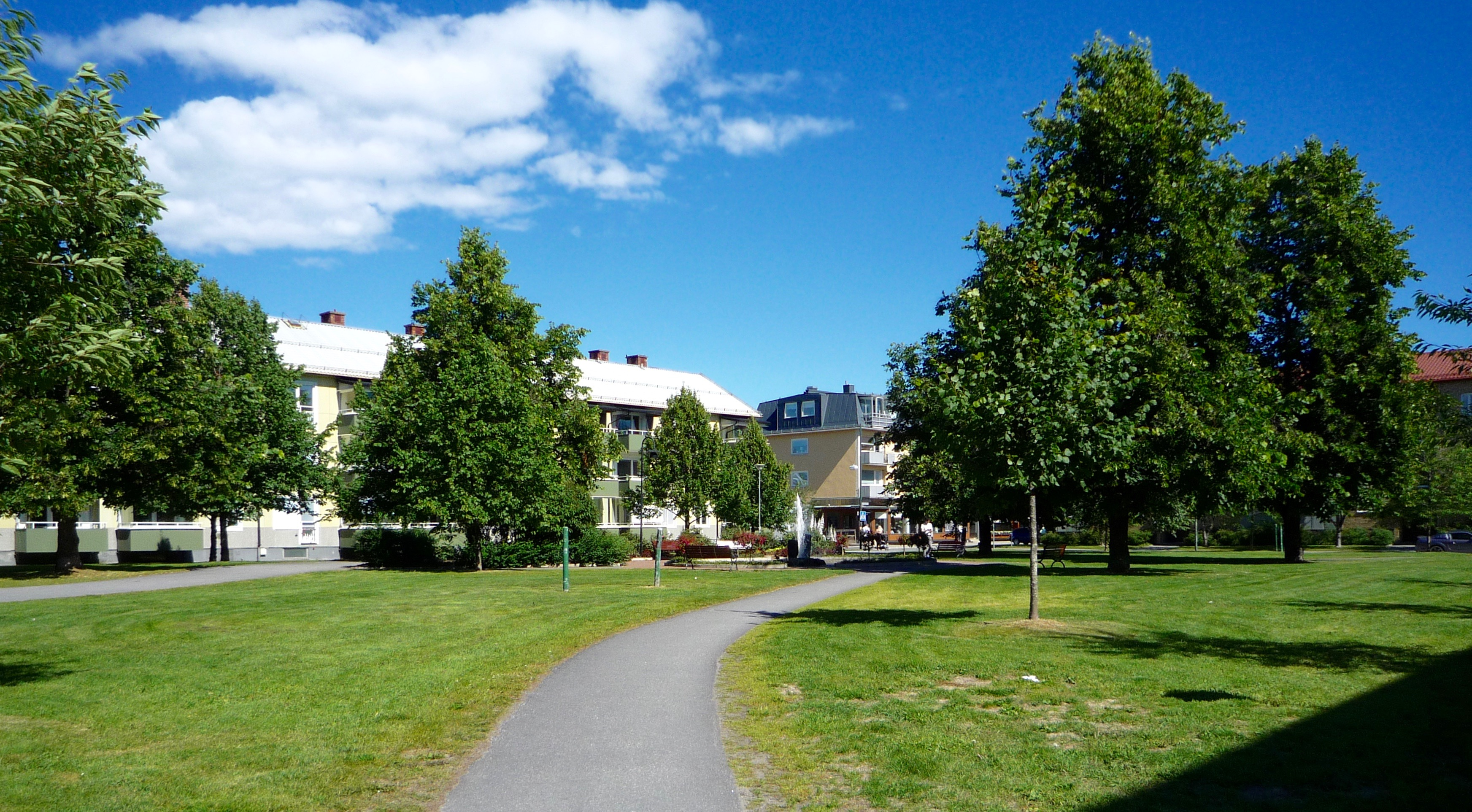 Döbelns plan är en park i Umeå, vid Kungsgatans början.